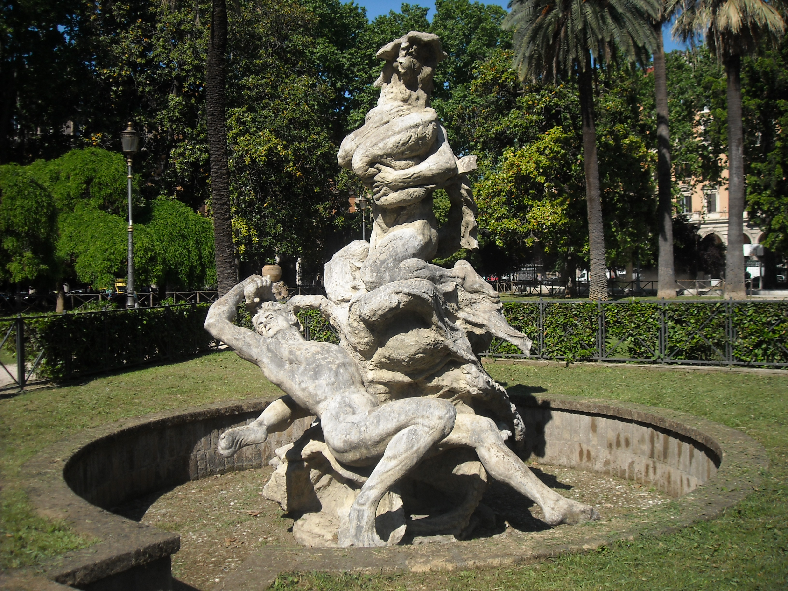 Il gruppo scolpito per la prima realizzazione della fontana delle Najadi, in Roma, poi rimosso e trasferito nei giardini di piazza Vittorio Emanuele II